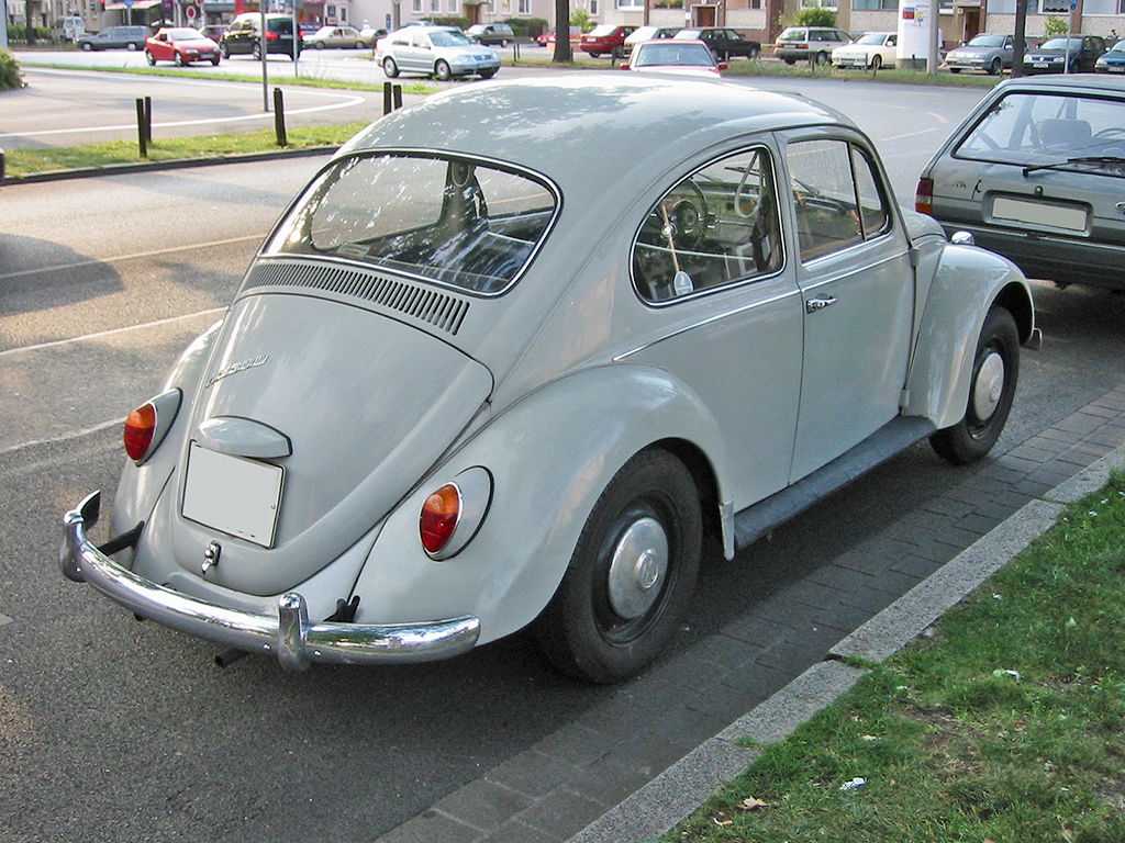 VW 1300 (Modell 67, gebaut von September 66 bis August 67)